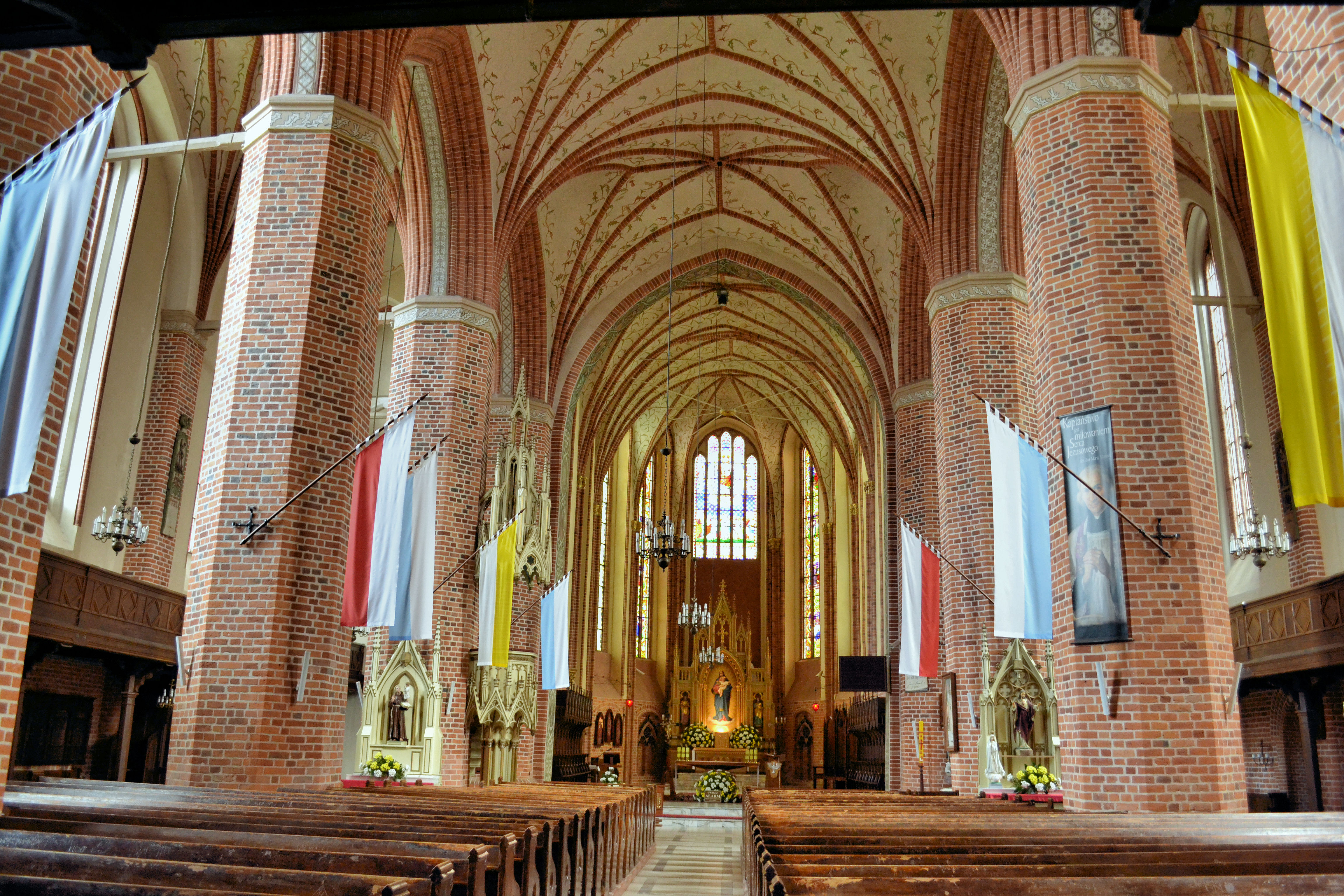 kościół Macierzyństwa NMP Trzebiatów